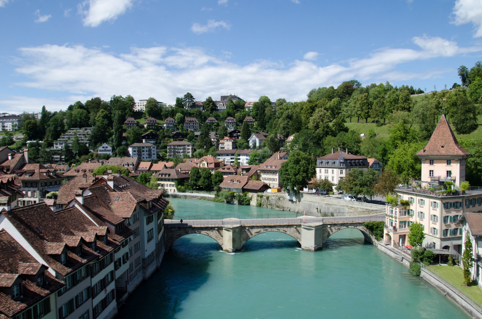 Aare river, Bern